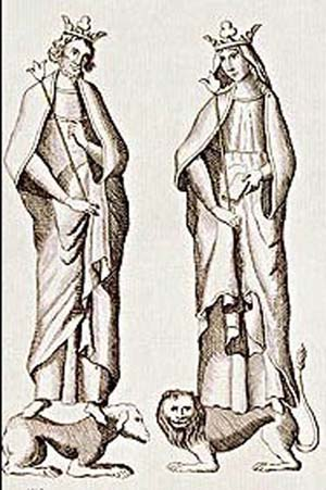 Vilém Dobyvatel s Matildou